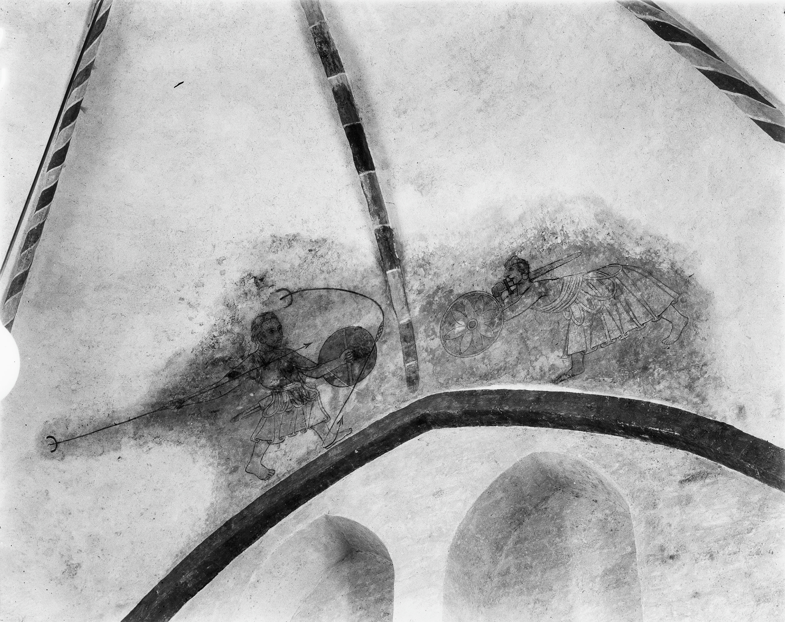 Nederlands Hervormde Kerk: exterieur en interieur